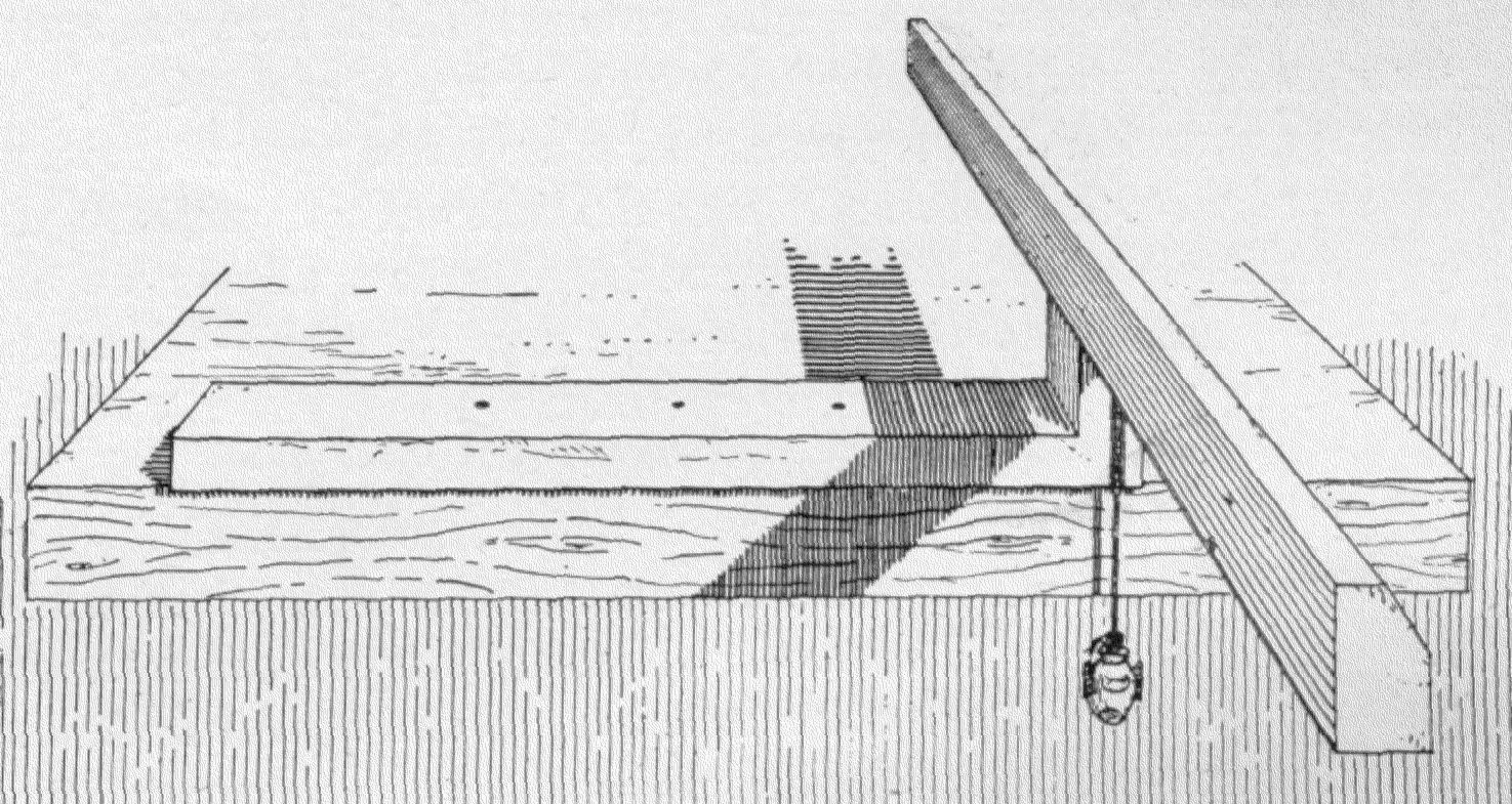 Altes Ägypten: Sonnenuhr-Rekonstruktion gemäß Ausführungen im Osireion, wahrscheinlich aus der Zeit von Sethos I. (1290 bis 1279 v. Chr.) Die Uhr wurde am Mittag gewendet, sie zeigte am Vormittag mit dem Querbalken nach Osten, am Nachmittag nach Westen.